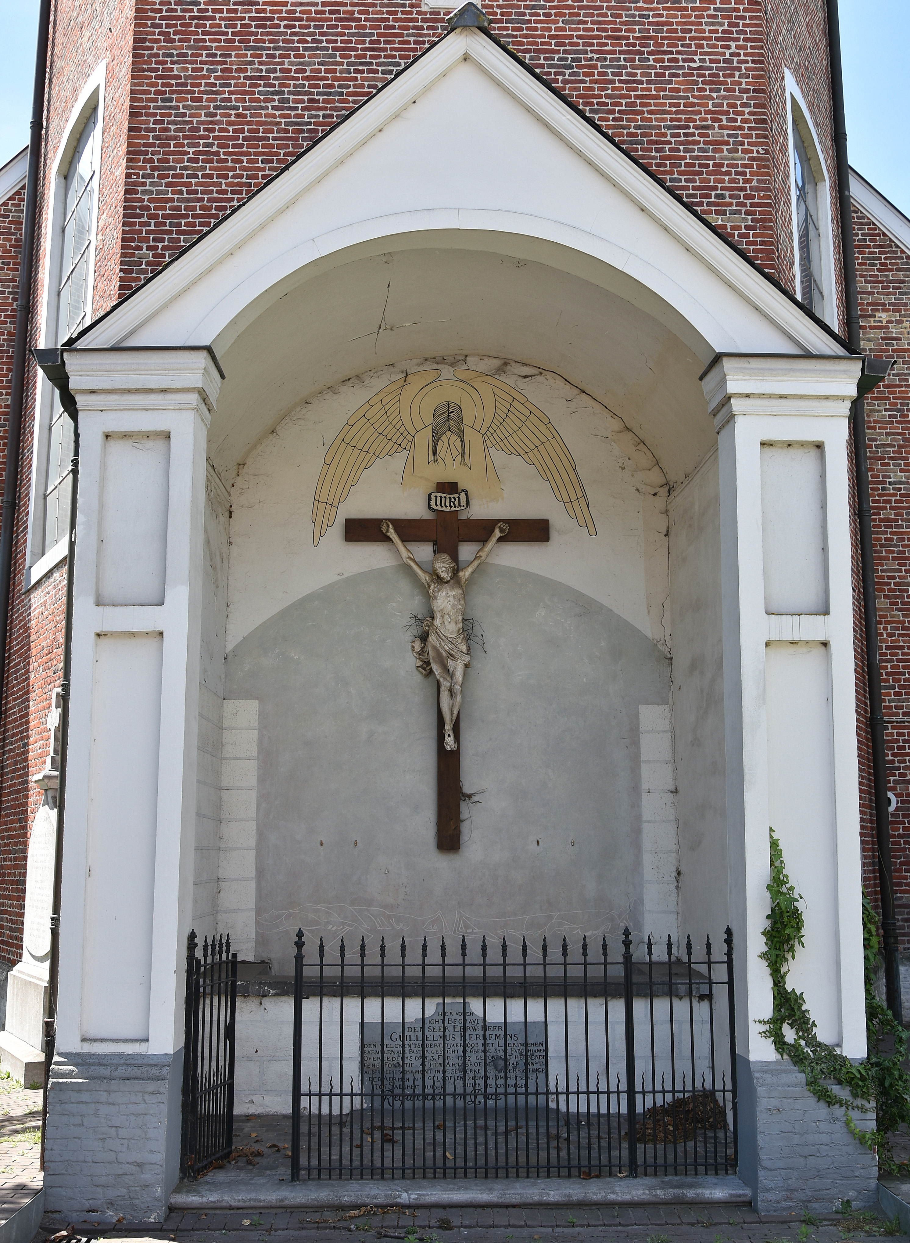 Calvarie Sint-Gilliskerk (Lembeke) (44646) 2-06-2019 14-25-27